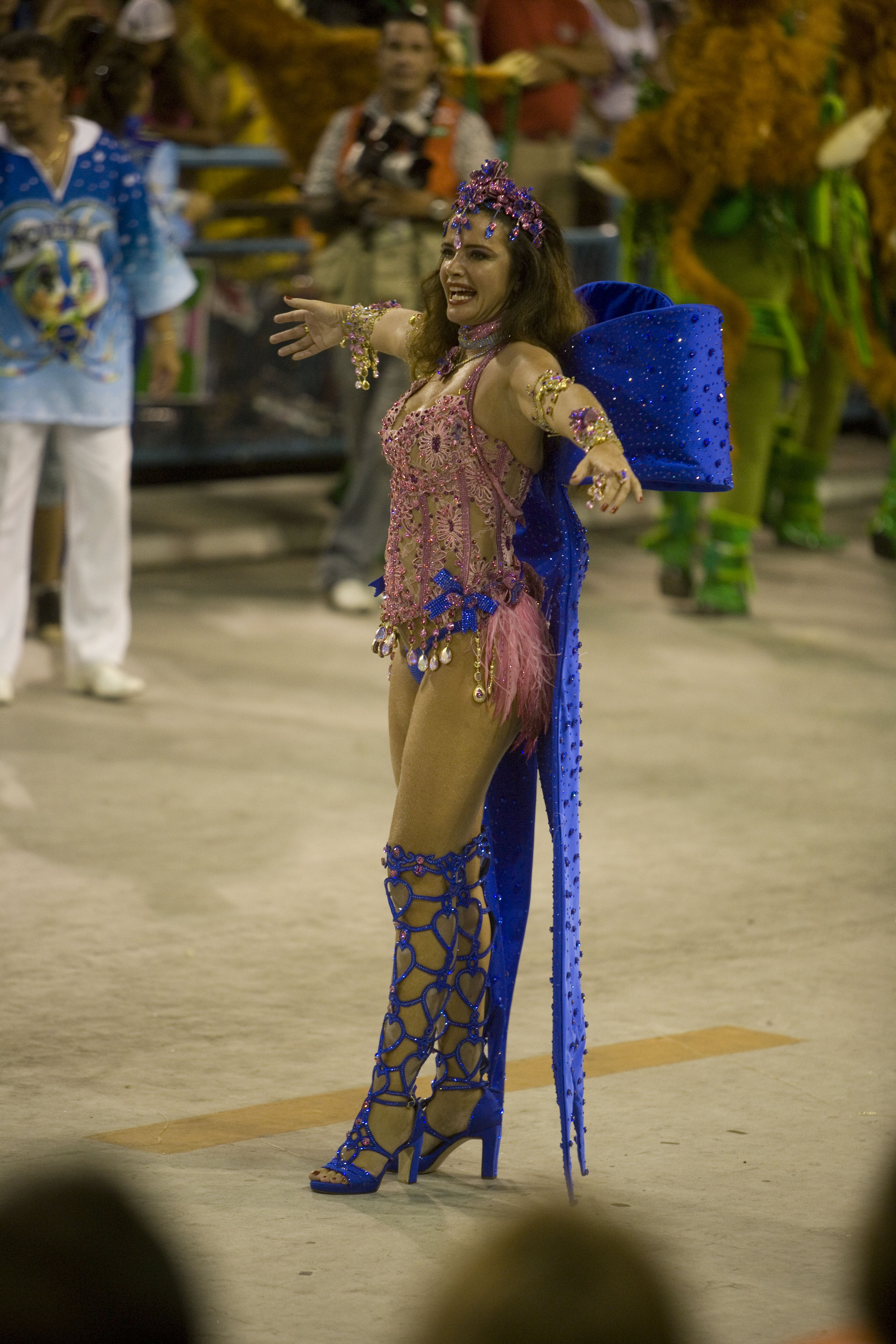 Luma de Oliveira Portela Carnaval 2009 Segunda, 23 / 02 /2009 Camarote da Brahma